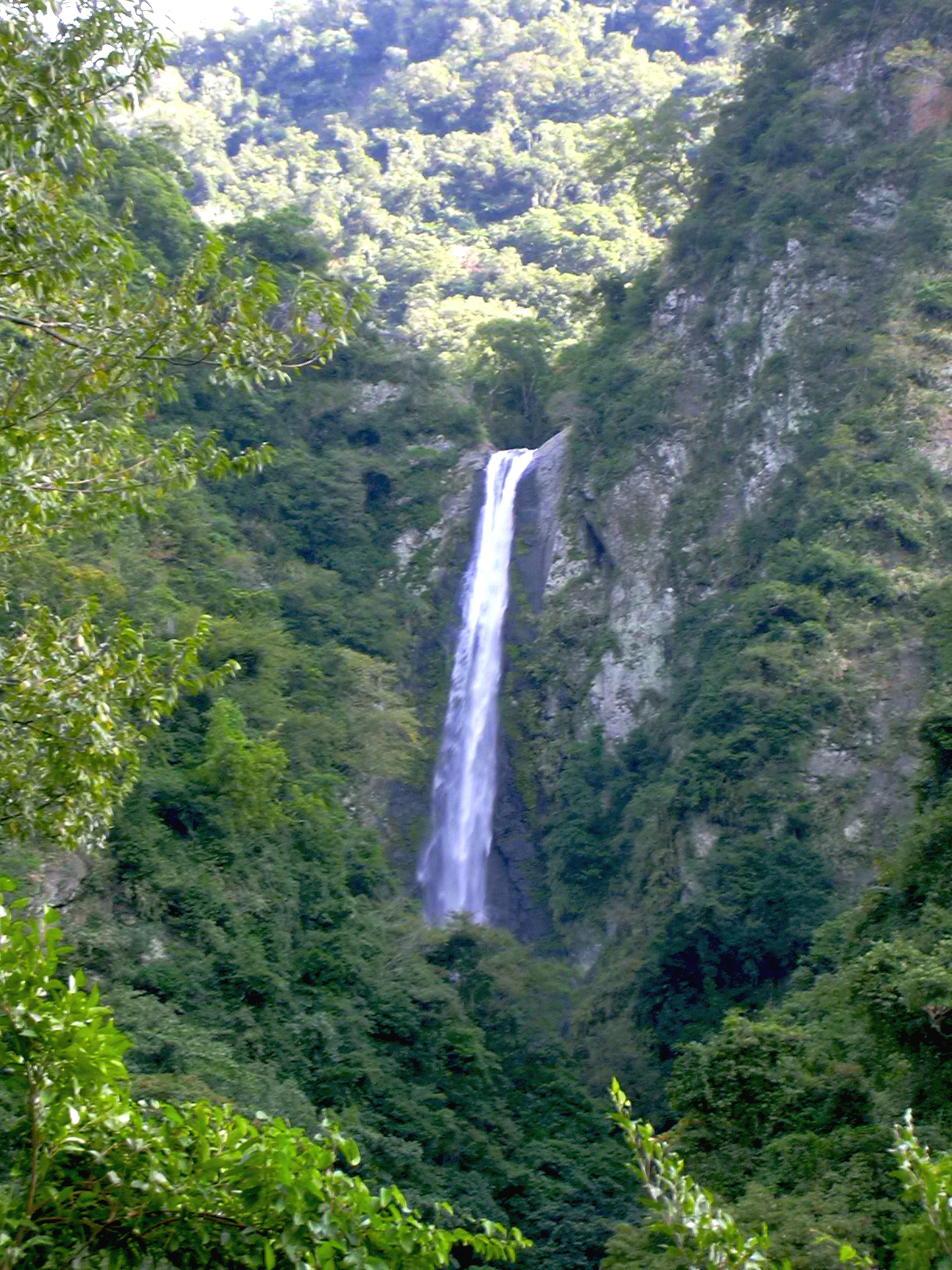 遠眺羅山瀑布